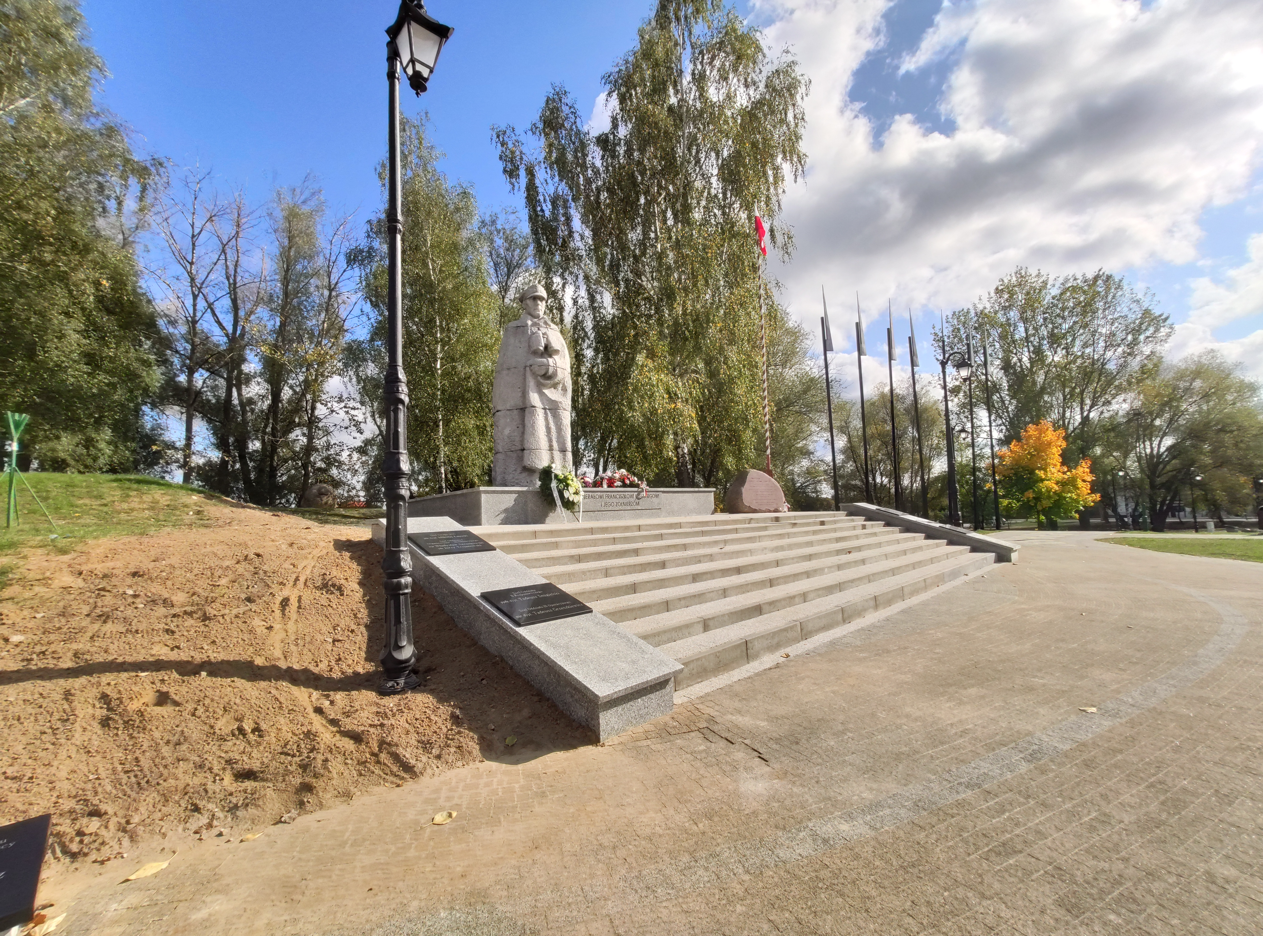 Pomnik gen. Kleeberga w Kocku po remoncie w 2019r.